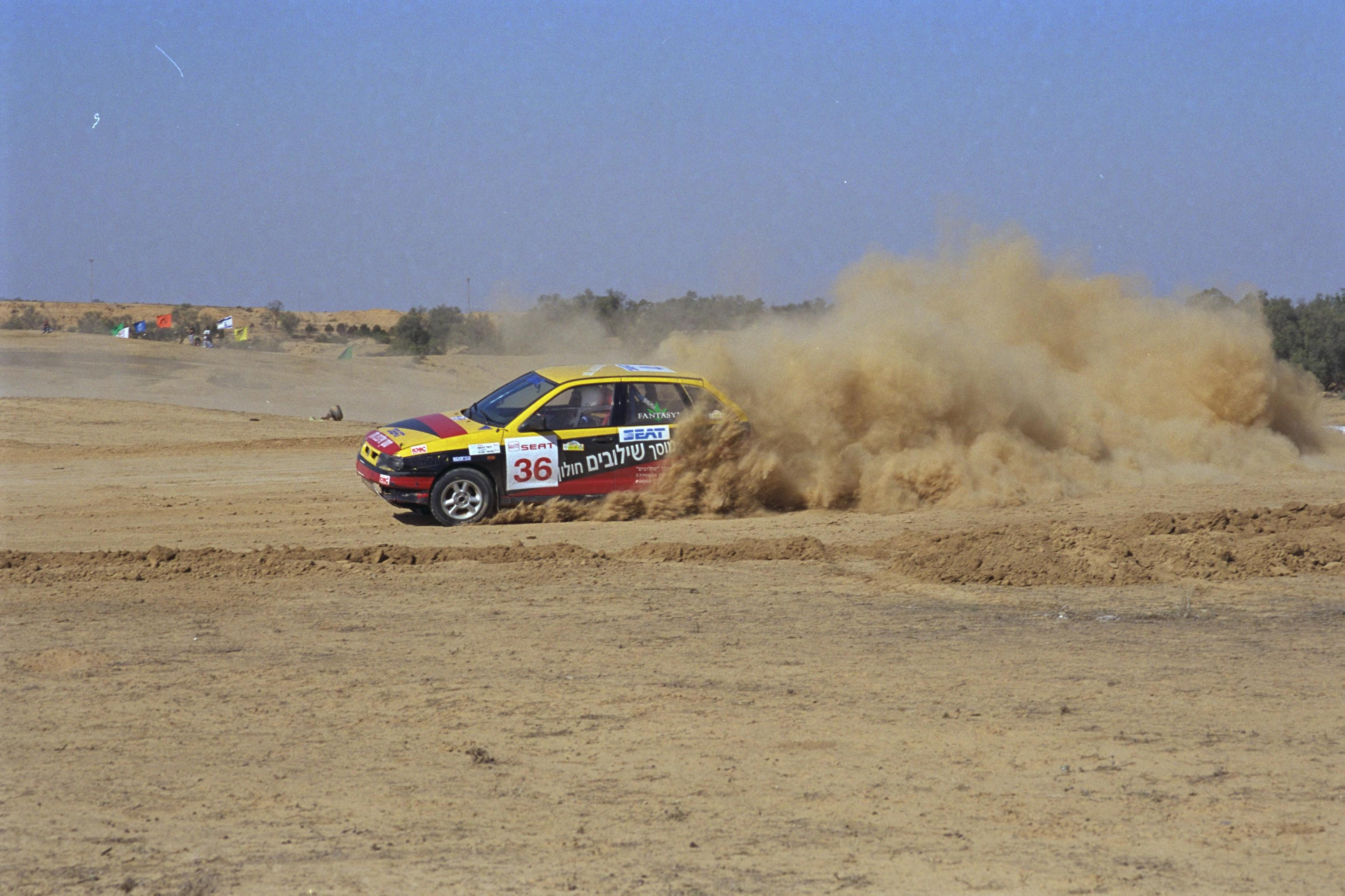 A SPORTS CAR DURING A RACE IN ESHKOL PARK IN THE NEGEV (11/11/2000). מכונית ספורט במהלך מרוץ בפארק אשכול בנגב Photo: MARK NEYMAN.